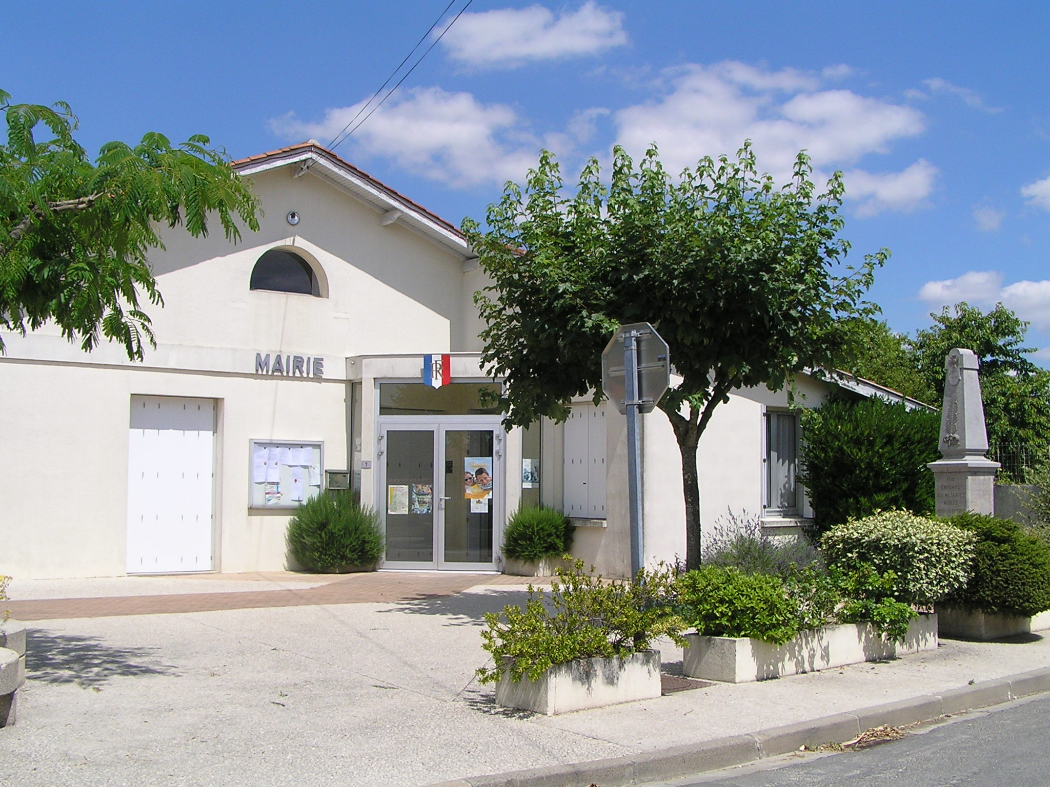 mairie de Les Métairies